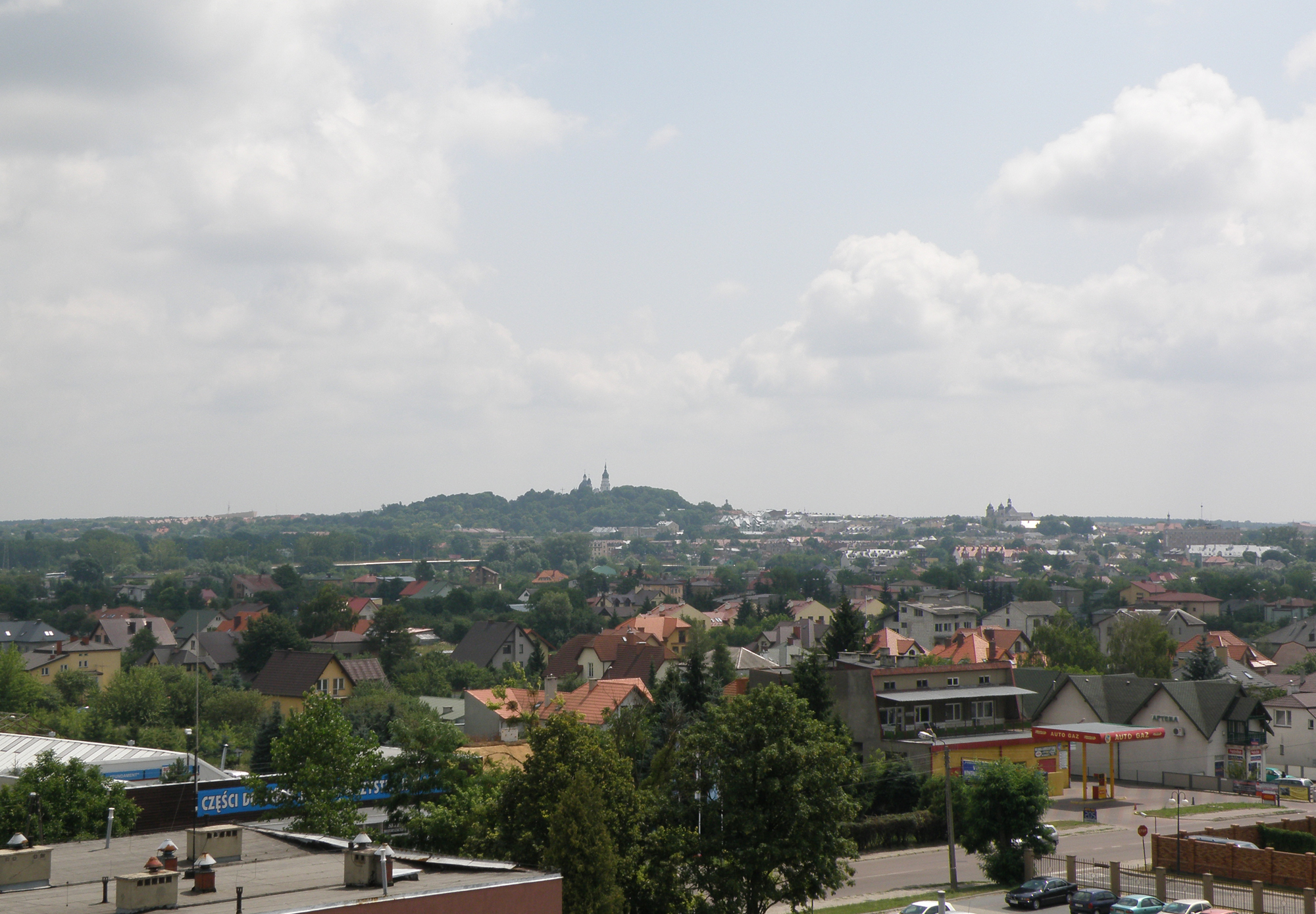 Chełm